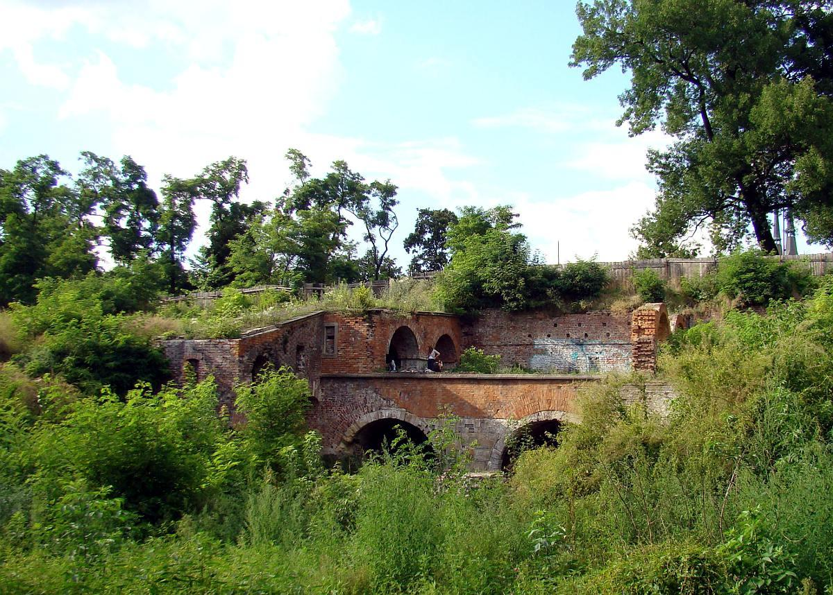 Bastion Ceglarski.